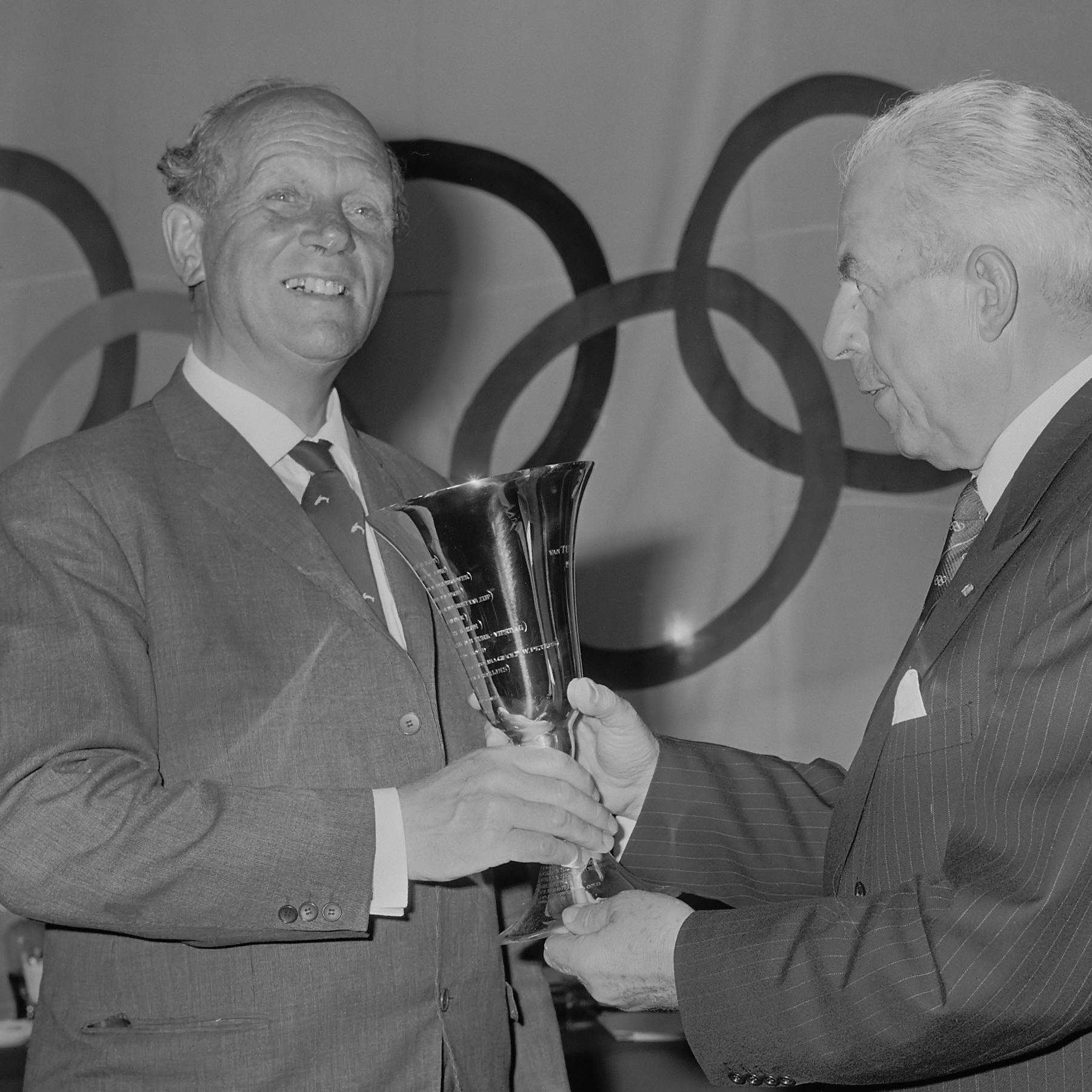 Van Tuyllbeker voor de Roeibond, jhr. H. A. van Karnebeek (rechts) geeft de beker aan dr.A. J. H. van Dokkum 10 juni 1965